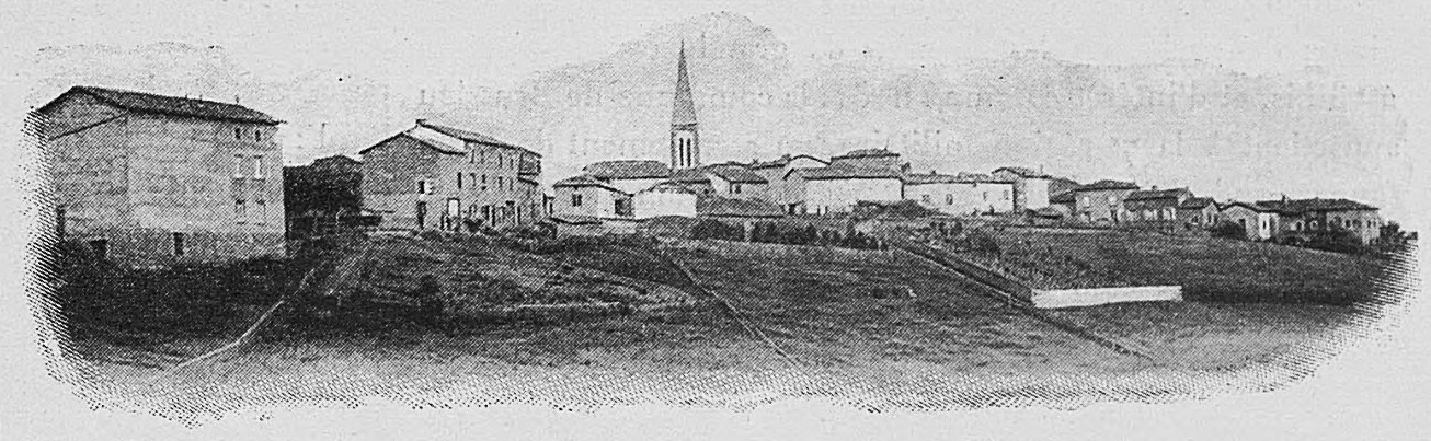 Dictionnaire illustré des communes du département du Rhône. Tome 1 / par MM. E. de Rolland et D. Clouzet.